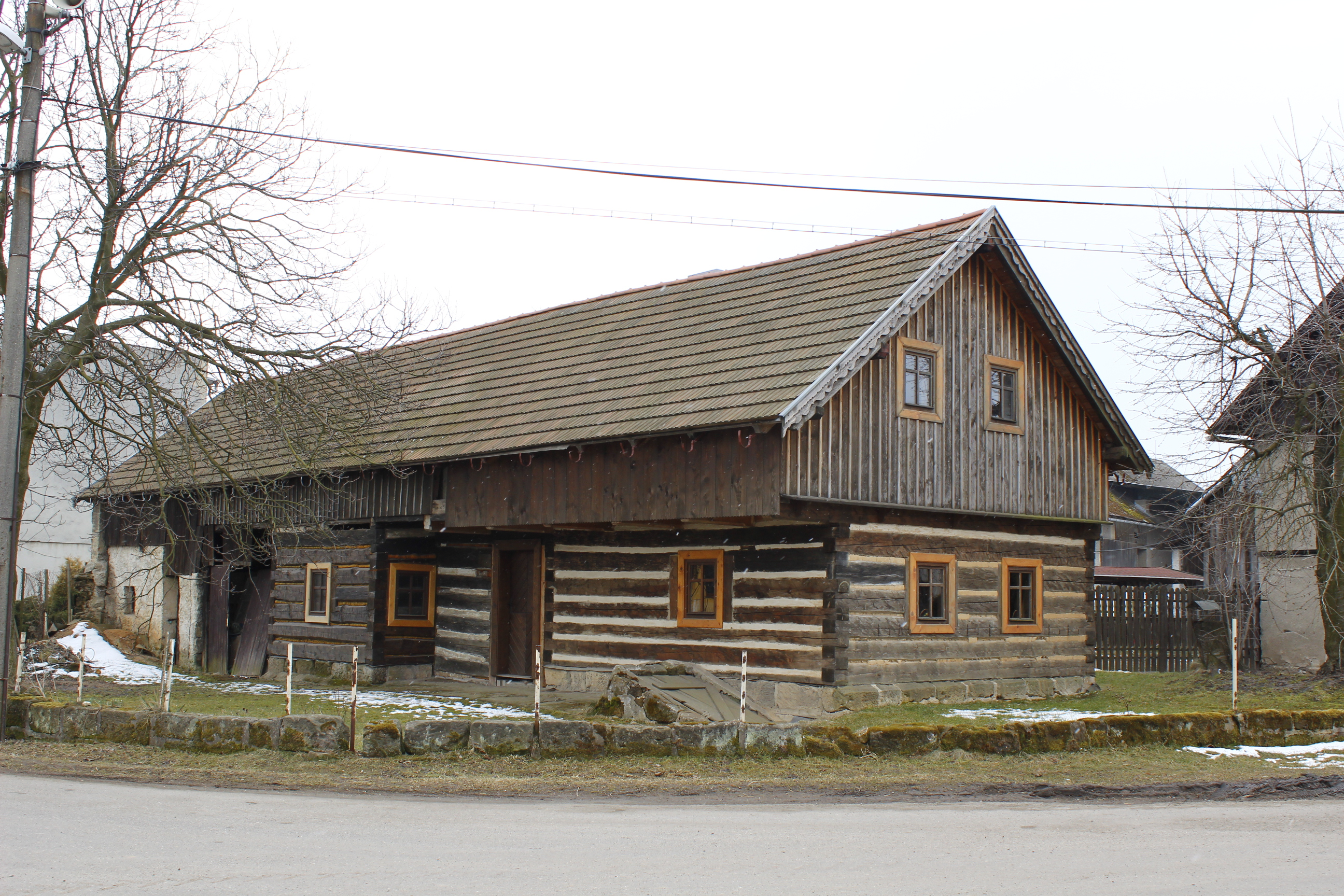 Roubený dům číslo popisné 40 v Březovicích na Mladoboleslavsku.